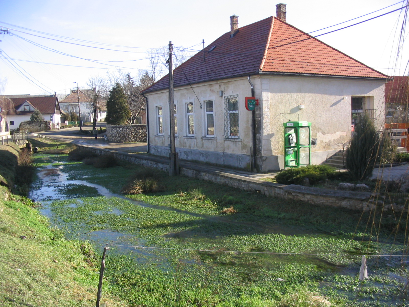 Kádárta postája, posta patakkal